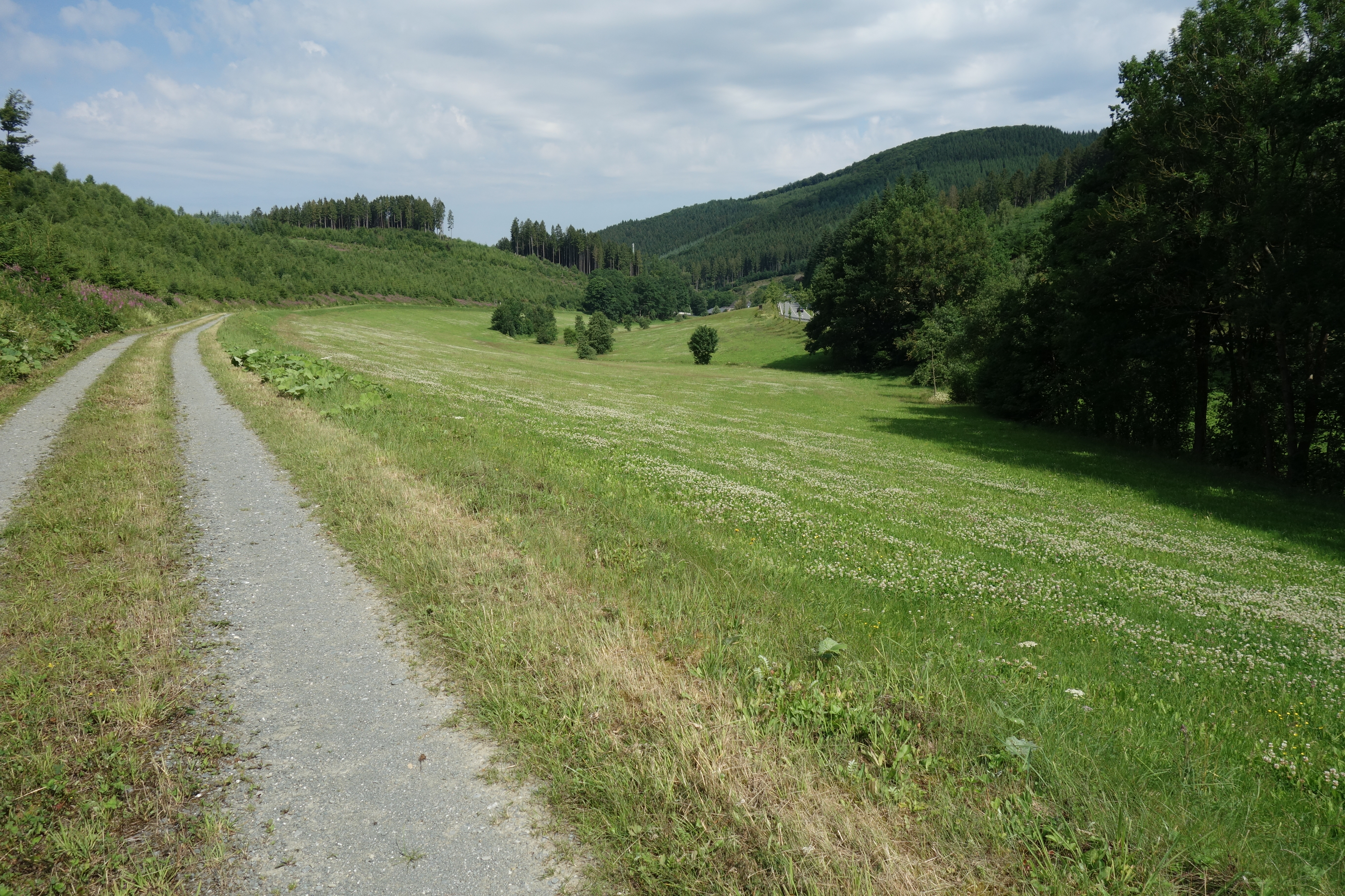 Grünland gehört zum Landschaftsschutzgebiet Talräume der Bieke und der Kleinen Henne bei Bonacker und Wald zum LSG Meschede. Von Deponie aus gesehen.